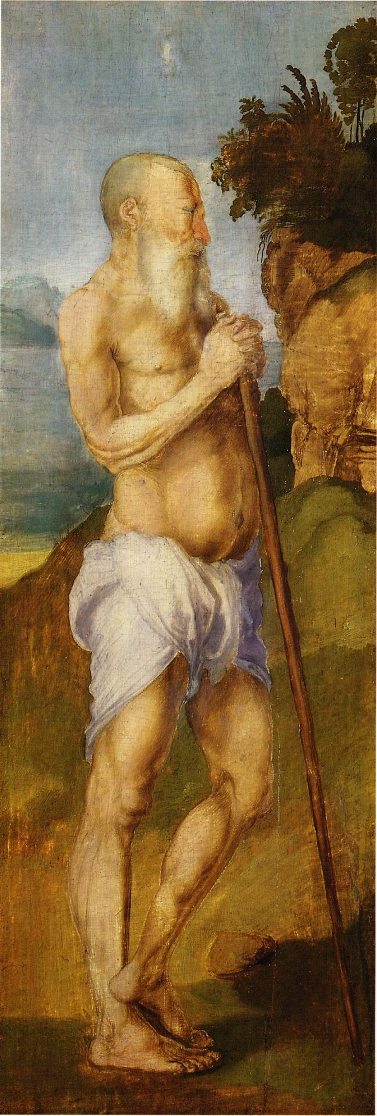 der Heilige Onuphrius, lebte um 400 n. Chr. für sechzig Jahre einsam in der thebäischen Wüste und soll sich von den Früchten einer Dattelpalme und einer Hostie ernährt haben, die ihm wöchentlich durch einen Engel gebracht wurde.